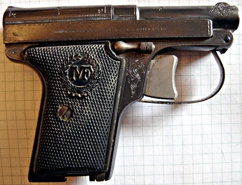 My Picture ( Lax) Calibre 6.35 mm Fabriqué par la Manufacture d'armes de St Etienne, à partir de 1914 en jusqu'en 1966 avec de nombreuses modifications techniques. Marché grand public mais aussi utilisé par certains officiers dans l'armée. Le pistolet fonctionne uniquement en "double action". C'est-à-dire que l'appui sur la détente engendre systématiquement un armement et un décrochage du percuteur. Le canon est fixé par goupille à l'avant et maintenu à l'arrière par un verrou à ressort, manoeuvrable par levier sur la face droite de l'arme, qui permet lorsque ce dernier est libéré, le relèvement du canon pour l'introduction d'une cartouche, le relèvement étant assuré par une lame ressort faisant office de pontet, le canon est libéré automatiquement également lorsque l'on retire le chargeur.